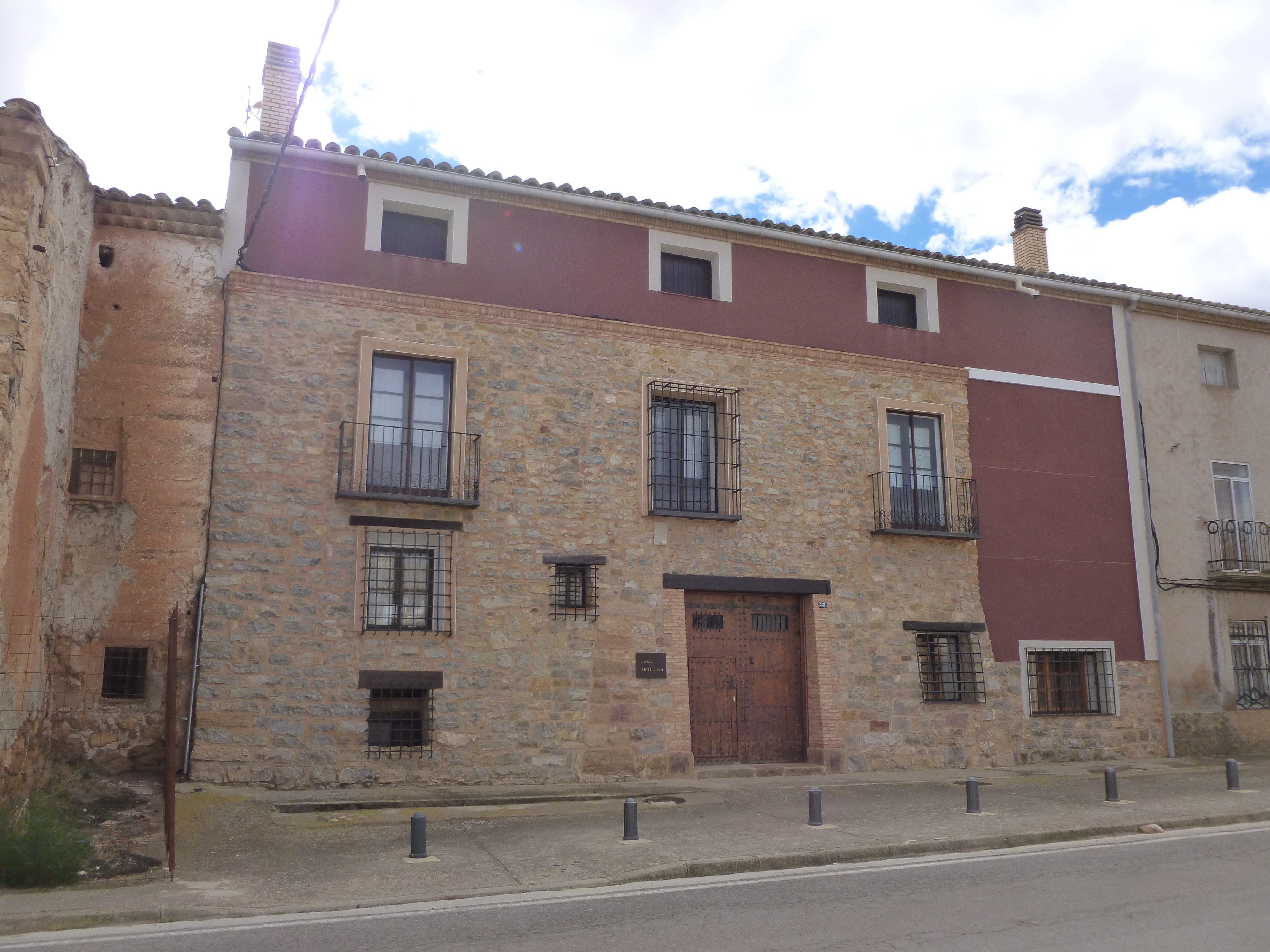 Santa Eulalia del Campo